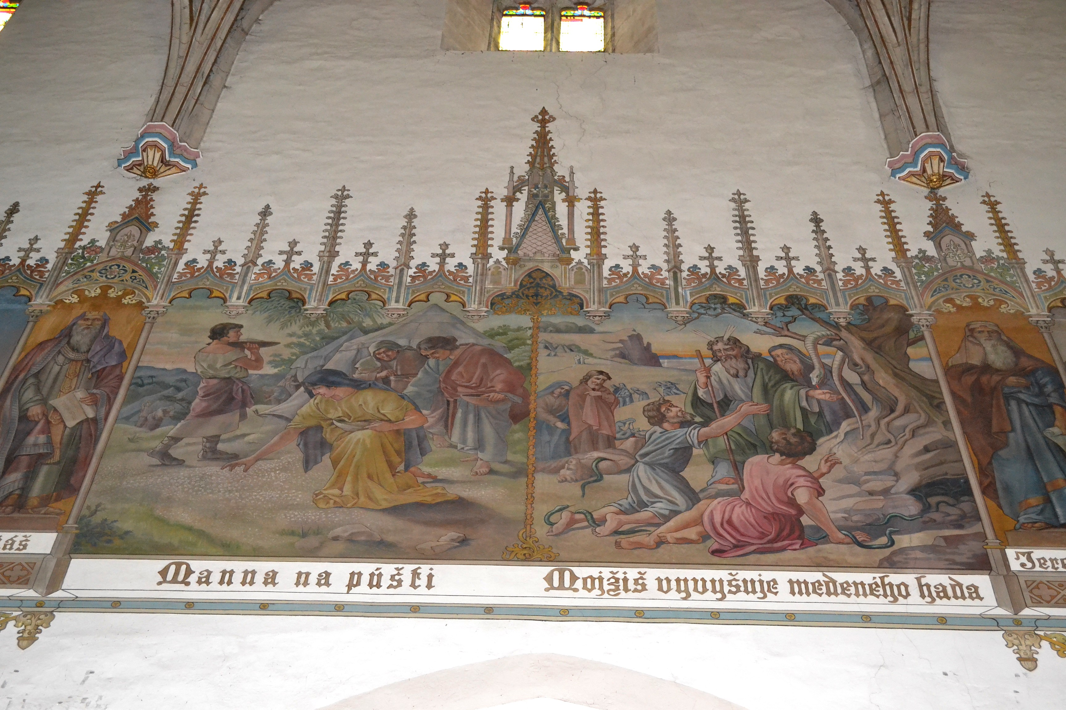 Bazilika svätého Mikuláša; južný múr hlavnej lode; maľby s výjavmi zo Starého zákona